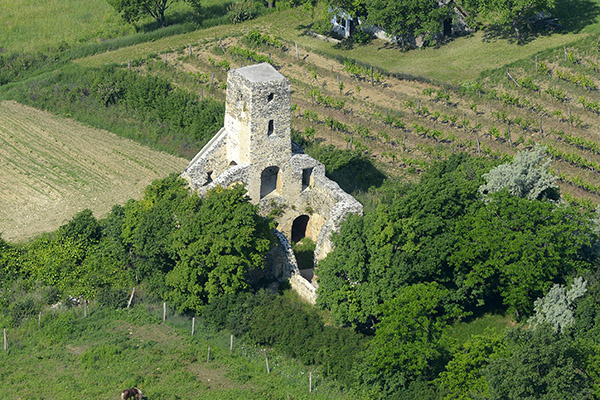 Szent Balázs templomrom légi felvételen